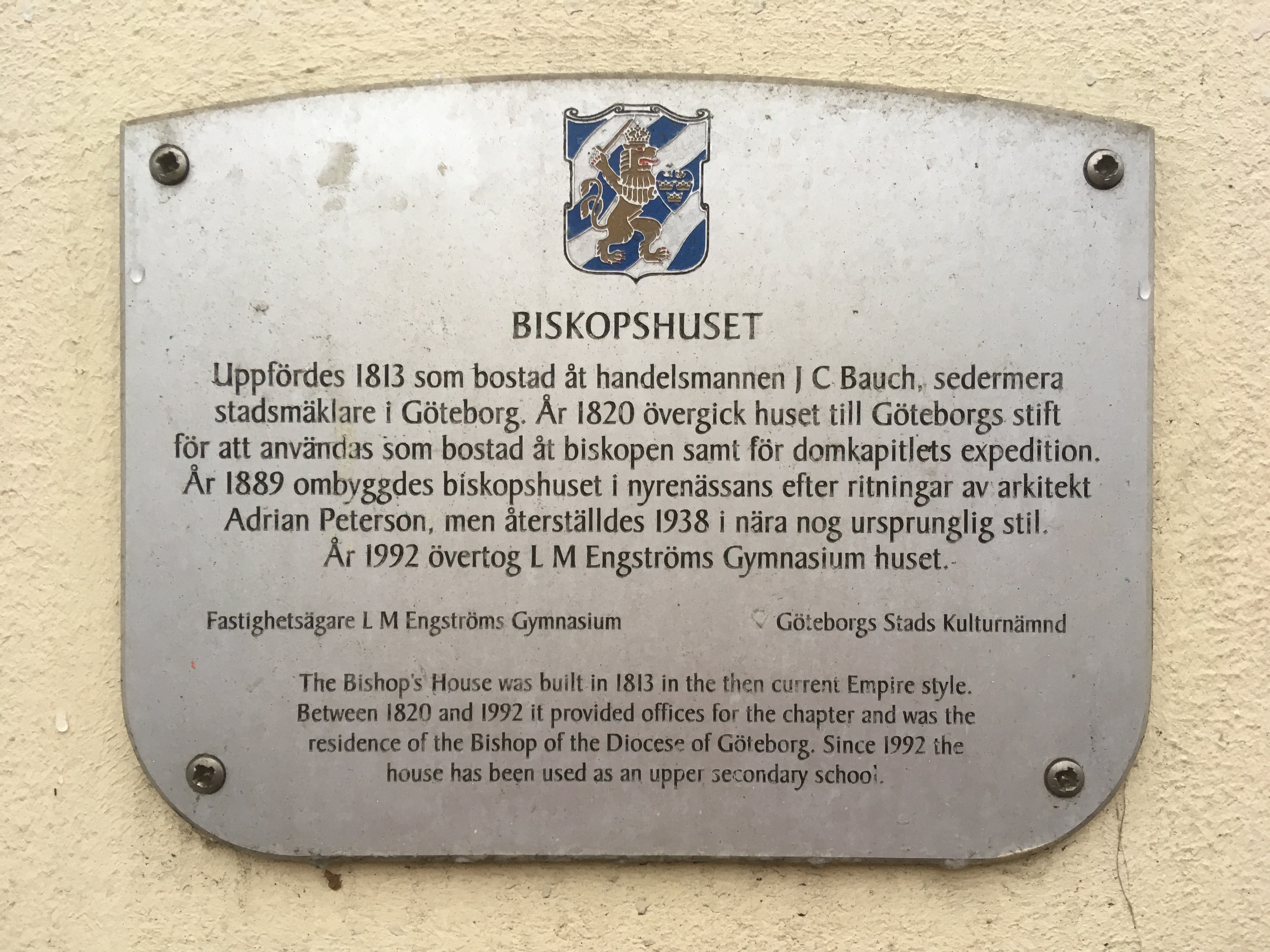 Skylt på väggen av biskopshuset i Göteborg, Västra Hamngatan 17. Plaketten sattes upp som en del av Göteborgs stads kulturnämnds "Projekt Husmärkning" kring åren 2000-2001 där drygt etthundra skyltar ingick. Se även boken "100 utmärkta hus i Göteborg". Vid en inventering av kommunen gjord 2016 satt 69 skyltar fortfarande uppe.